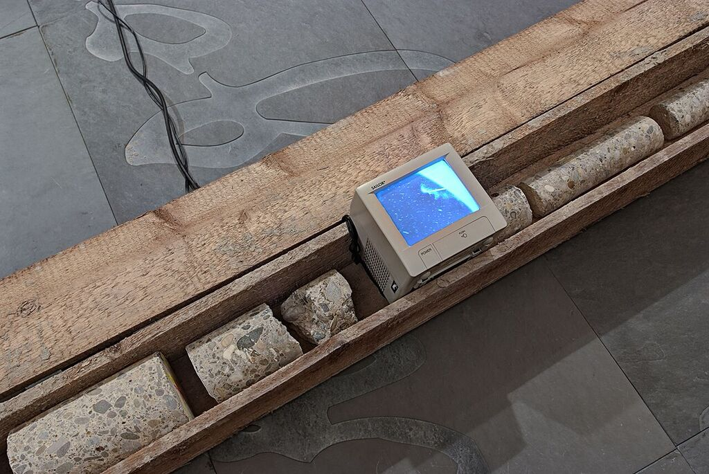 Soloprojekt "Core" in der Karthause Ittingen 2015